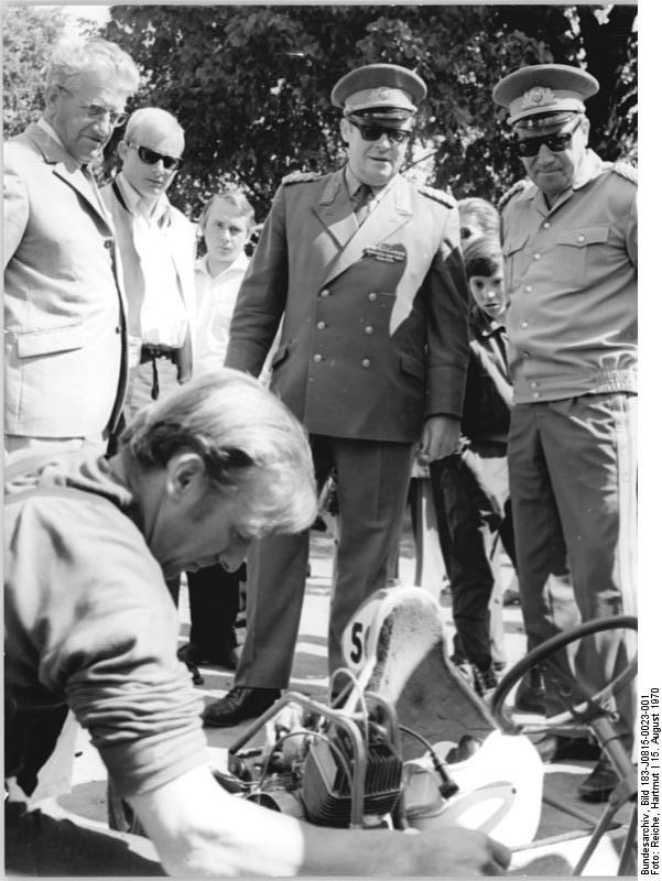 Zentralbild Reiche-15.8.70 Schwerin: K-Wagenrennen bei der I. Wehrspartakiade der GST Unter strahlendem Sonnenschein und hochsommerlichen Temperaturen wurden am 15.8.70 die Meisterschaften im K-Wagenrennen ausgetragen. Kurz vor dem Start wurden die kleinen Flitzer das letzte Mal überprüft, wobei sich der Schirmherr dieser Spartakiade, Bernhard Quandt, Mitglied des ZK der SED und 1. Sekretär der Bezirksleitung Schwerin (l.), Armeegeneral Heinz Hoffmann (r.) und der Vorsitzende des Zentralvorstandes des GST, Generalmajor Günther Teller (M.), als interessierte Beobachter zeigten.